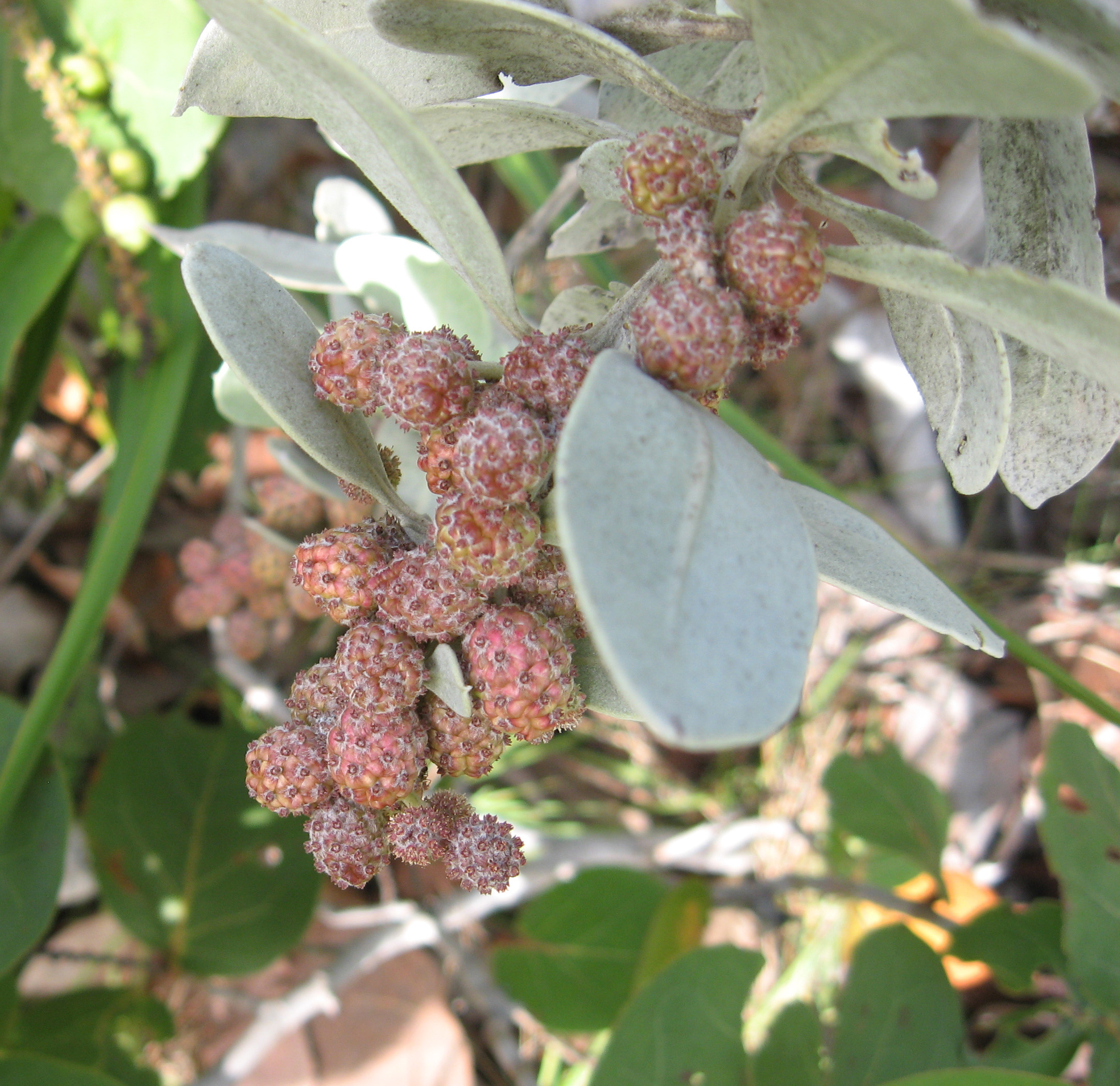 Conocarpus erectus var. sericeus, Key Largo, Monroe County, Florida.